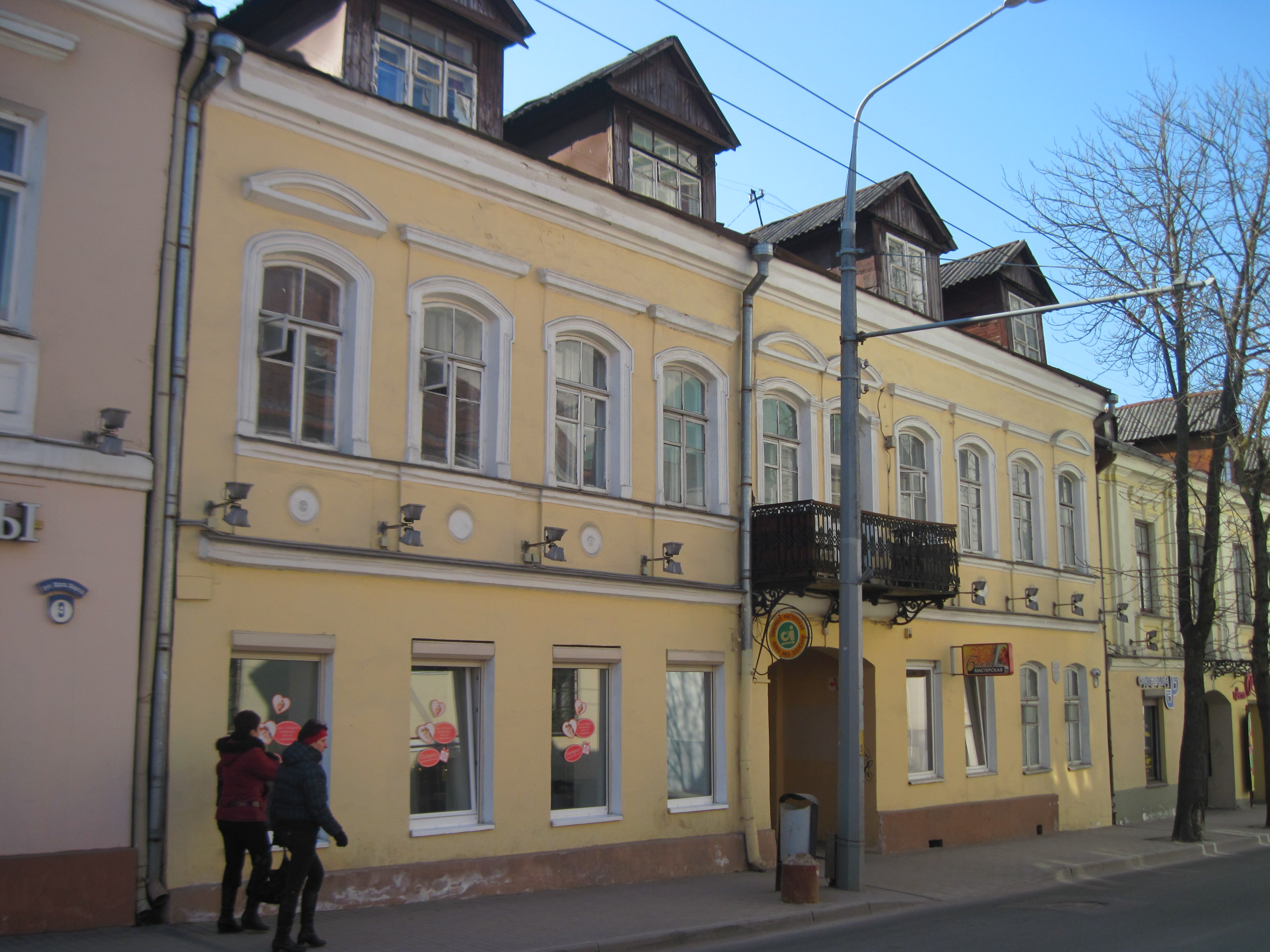 Забудова гістарычнага цэнтра Гродна. Вуліца К. Маркса, 7.